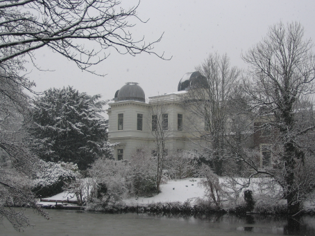 Oude Sterrewacht (Old observatory), Kaiserstraat, Leiden